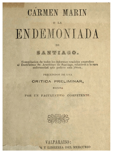 Portada de la investigación hecha por el Dr Manuel Antonio Carmona